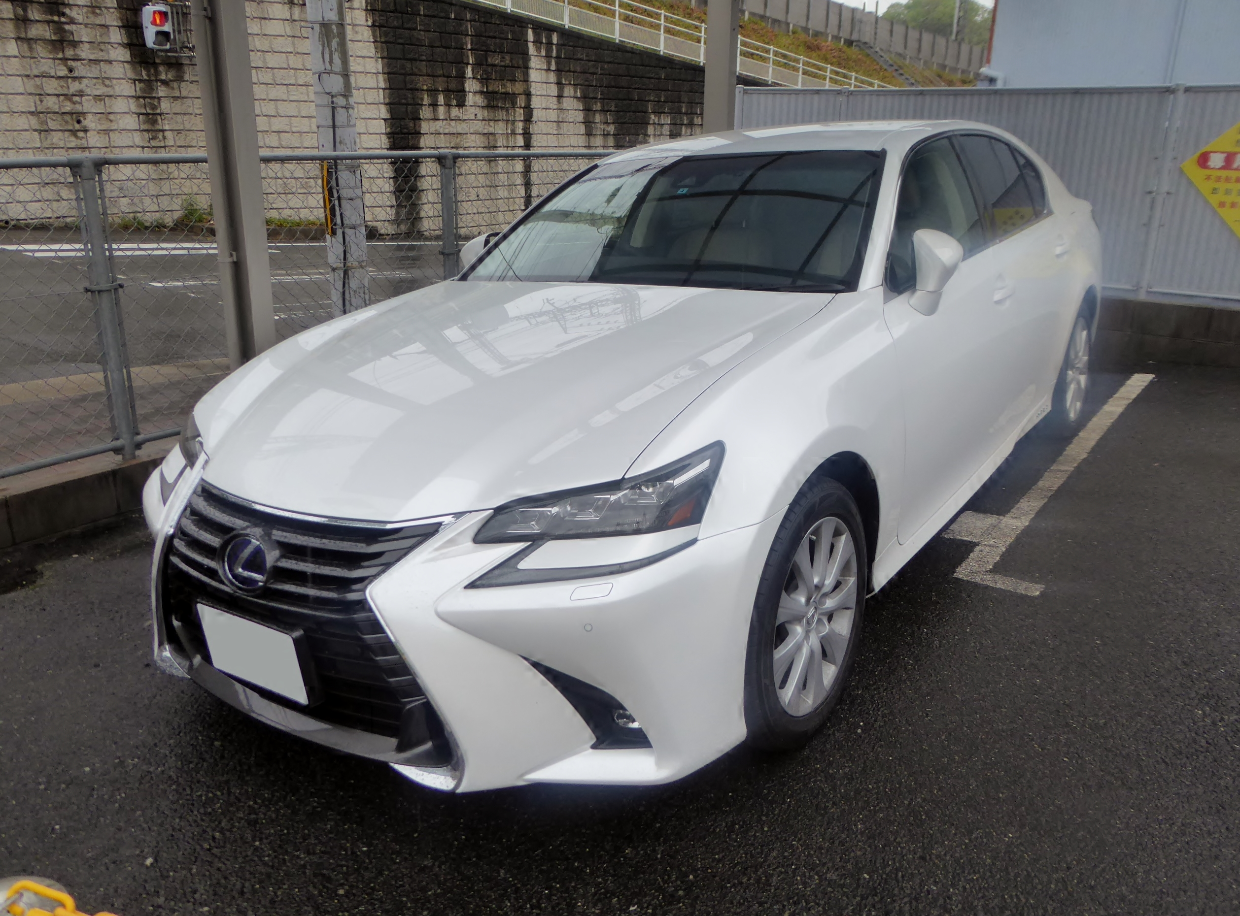 DAA-AWL10-BEXQH型レクサス・GS300hを撮影。